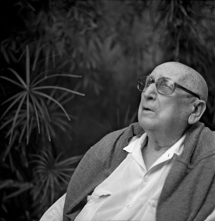 Edmond Charlot, jardin rue des Litanies, Pézenas, 2002